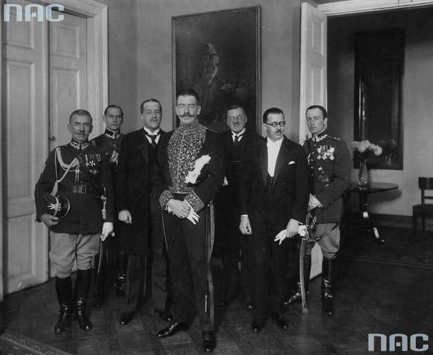 Wręczenie listów uwierzytelniających prezydentowi RP Stanisławowi Wojciechowskiemu przez posła nadzwyczajnego i ministra pełnomocnego Szwajcarii w Polsce Hansa de Segeseer-Brunegga. Hans de Segesser-Brunegg, poseł nadzwyczajny i minister pełnomocny Szwajcarii w Polsce (4. z prawej), dyrektor Protokołu Dyplomatycznego Ministerstwa Spraw Zagranicznych Stefan Przeździecki (3. z prawej), dyrektor Kancelarii Cywilnej Prezydenta RP Konstanty Lenc (3. z prawej), adiutant generalny prezydenta RP pułkownik Mariusz Zaruski (1. z lewej), adiutanci przyboczni prezydenta RP major Andrzej Meyer (2. z lewej) i porucznik Tomasz Łaszkiewicz (1. z prawej).